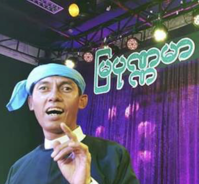 မြန်မာဘာသာ: သရုပ်ဆောင် ကင်းကောင်